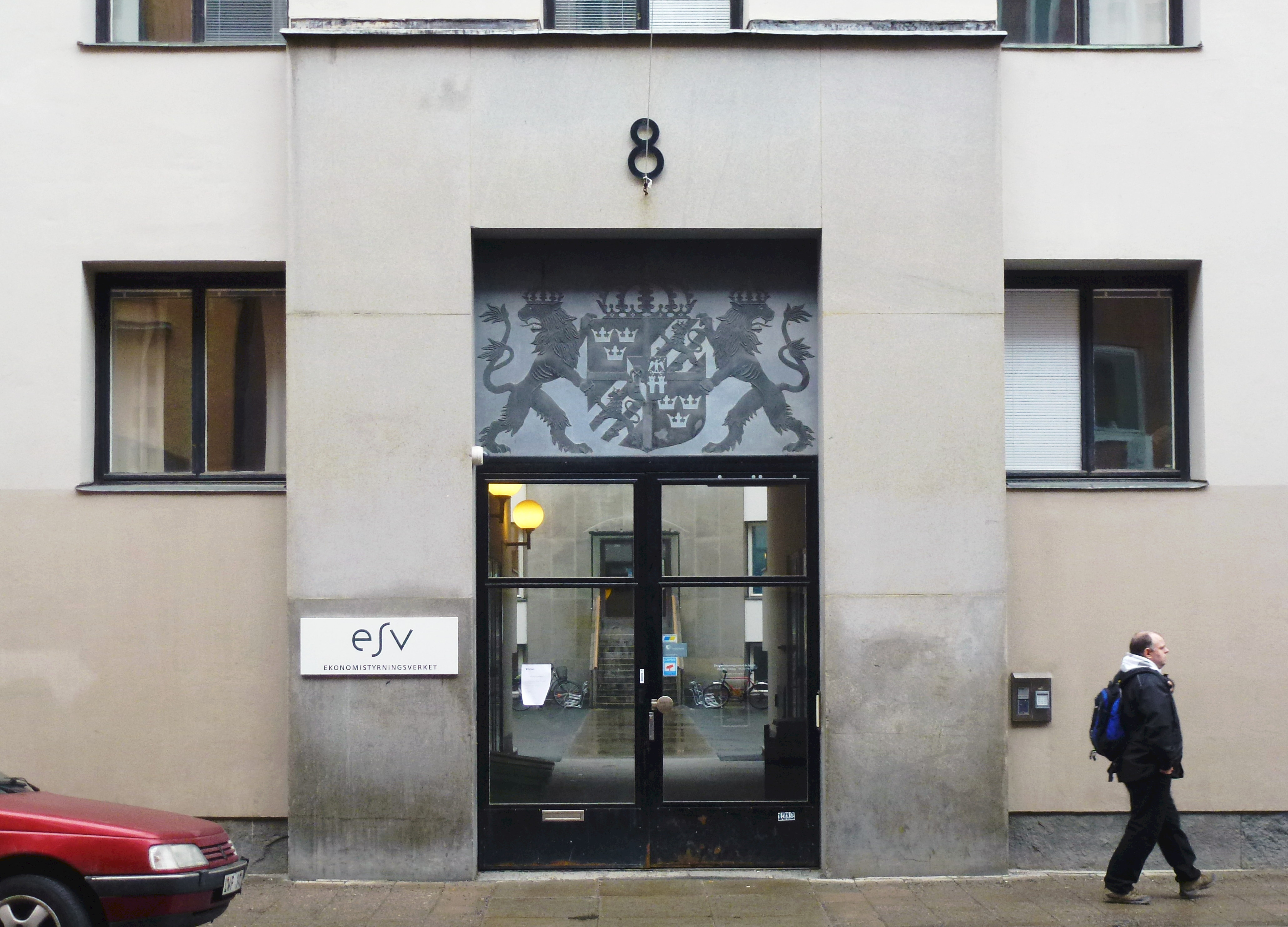 Riksförsäkringsanstaltens huvudentré